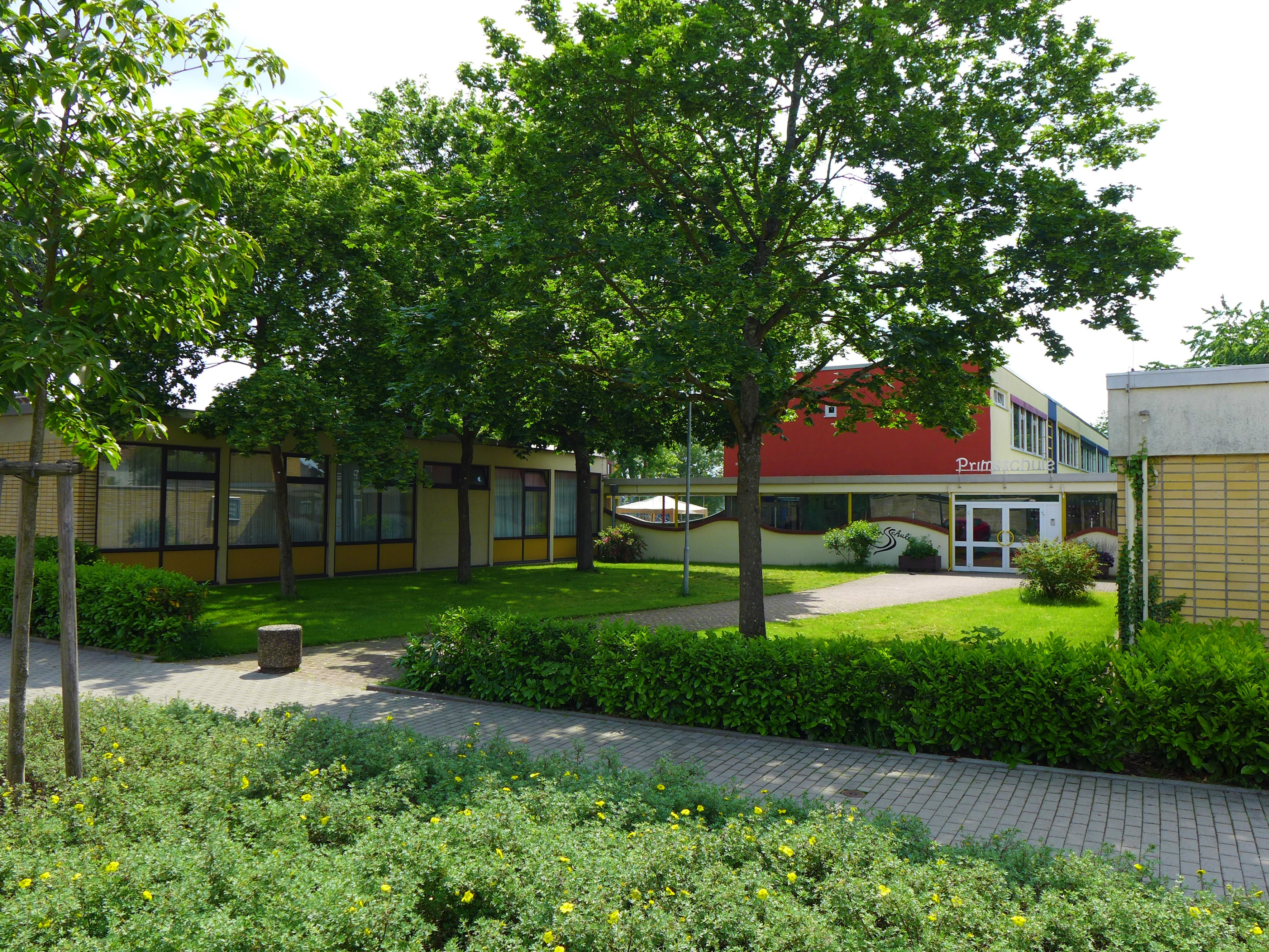 Diefflen, Primsschule